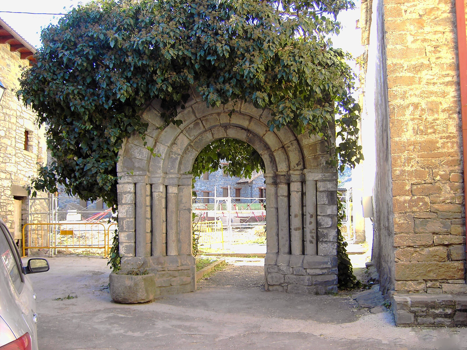 ASrco románico en Fiscal.